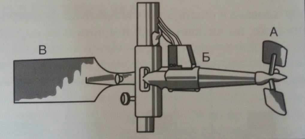 Српски (ћирилица): А - лопатице или крилца, Б - тело крила са преносним механизмом, В - стабилизатор